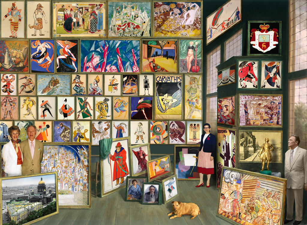 Групповой портрет, Евгений Шефер ("Шеф"). Лица, фигурирующие на картие: Джун и Никита Лобановы-Ростовские слева, На переднем плане, собачка Салли, Нина Лобанова-Ростовская посередине, Илья Самойлович Зильберштейн справа на фоне картин и собрания Лобановых-Ростовских